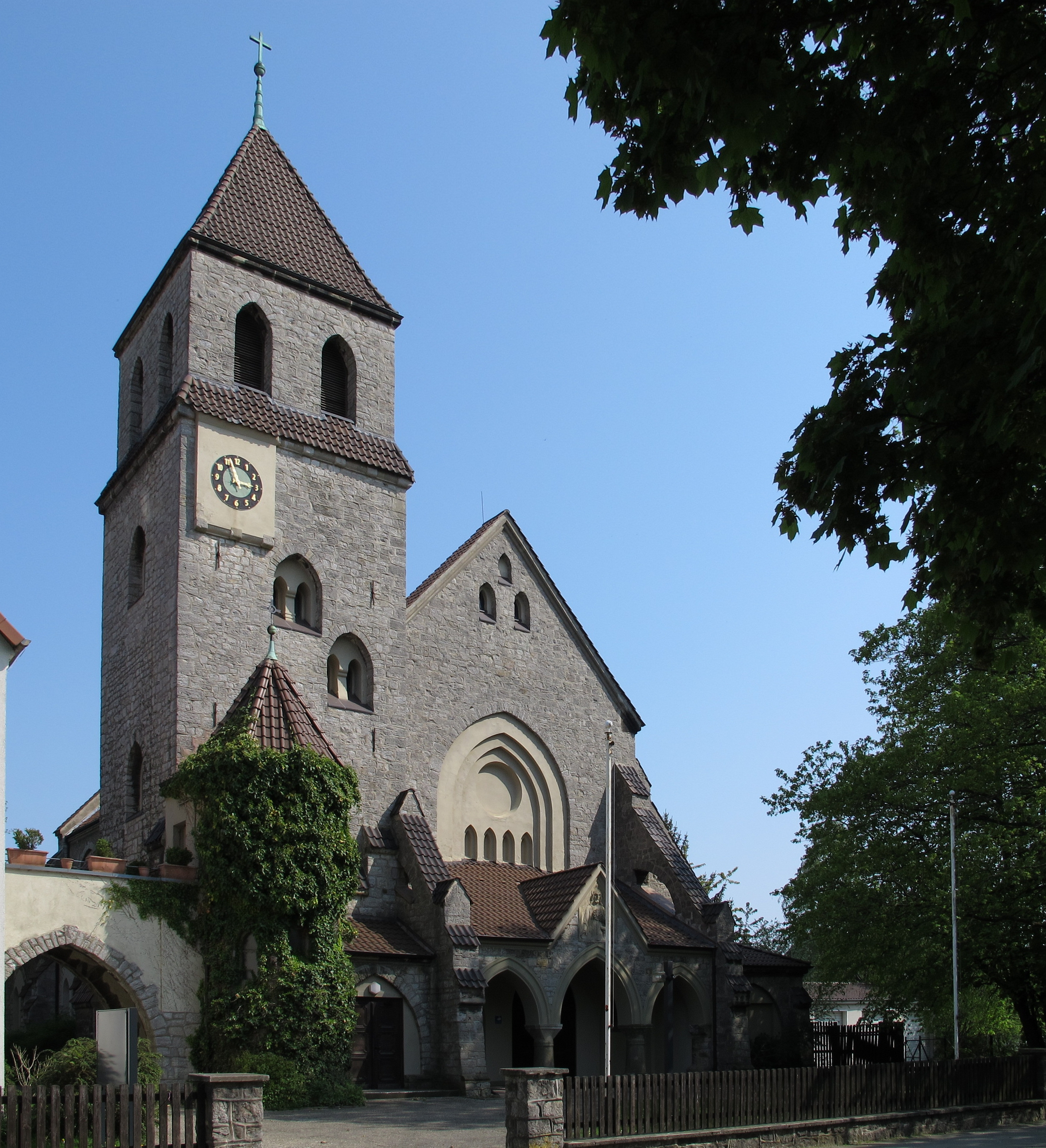 Das Kolumbarium Hl. Herz Jesu in Misburg (heute Stadtteil von Hannover)